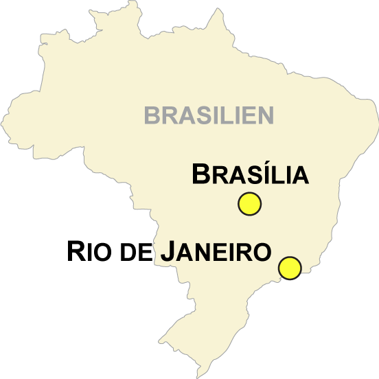 Austragungsorte der Futsal-WM 2008 in Brasilien This map is the result from a map request to the Kartenwünsche in the Kartenwerkstatt. You can make a request for a new map to us as well.